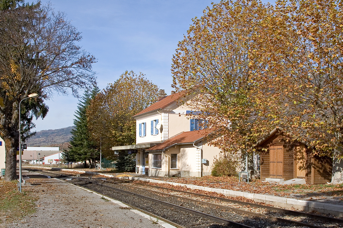 Gare de Chorges (France - Hautes-Alpes)